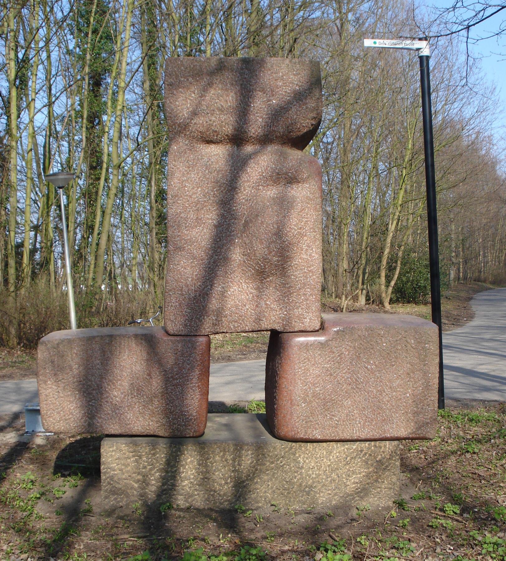 Beeldenpark Zwijndrecht. Kunstwerk "Torso" van Leo de Vries. Zwijndrecht/The Netherlands. FOP.